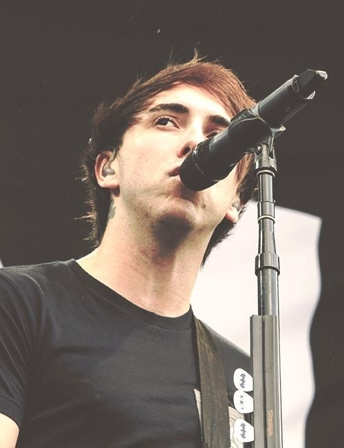 Alexander William Gskarth